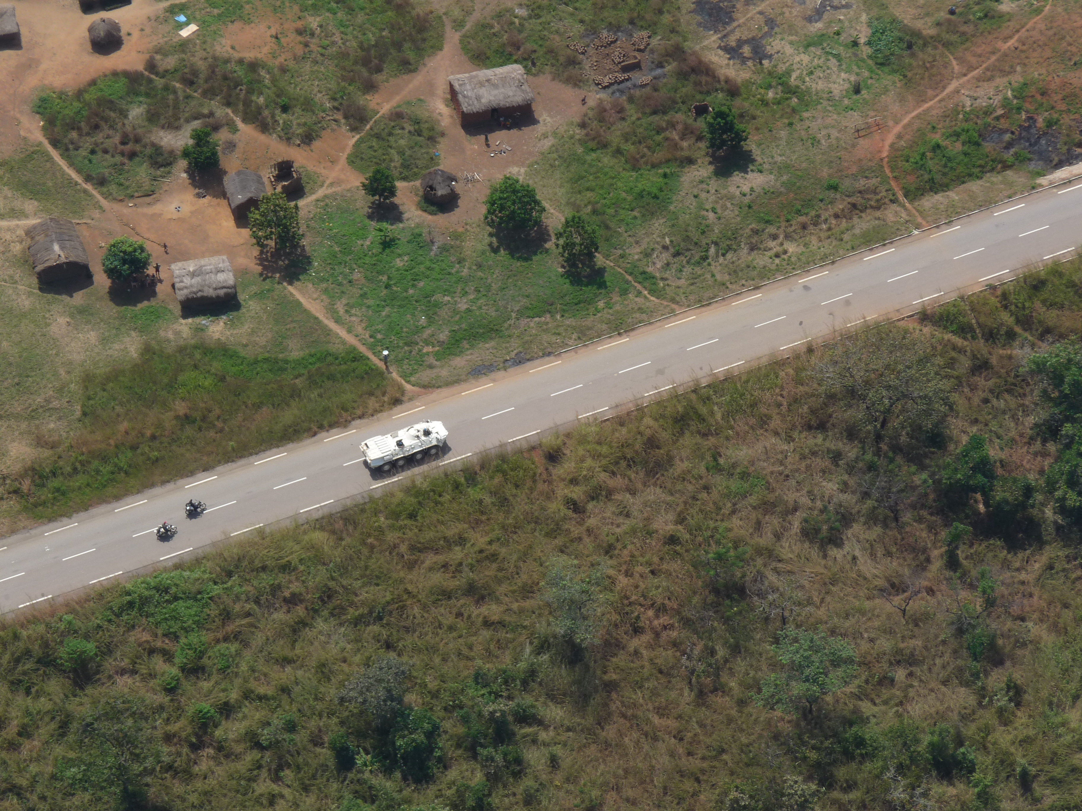 Véhicule blindé des Nations Unies escortant le convoi commercial Bangui-Douala.